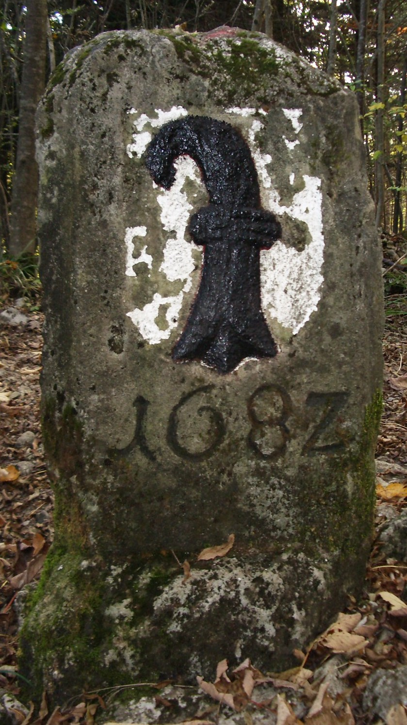 Border stone, Geissflue SO/BL, Switzerland self-made, October 2005